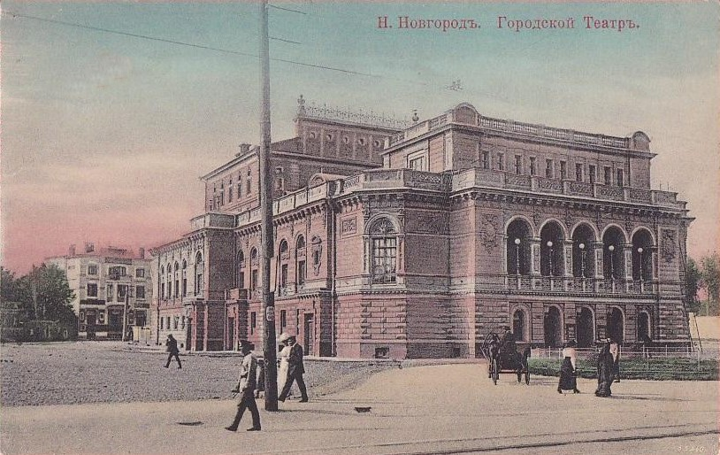 Николаевский городской театр в Нижнем Новгороде. Ныне — Государственный театр драмы